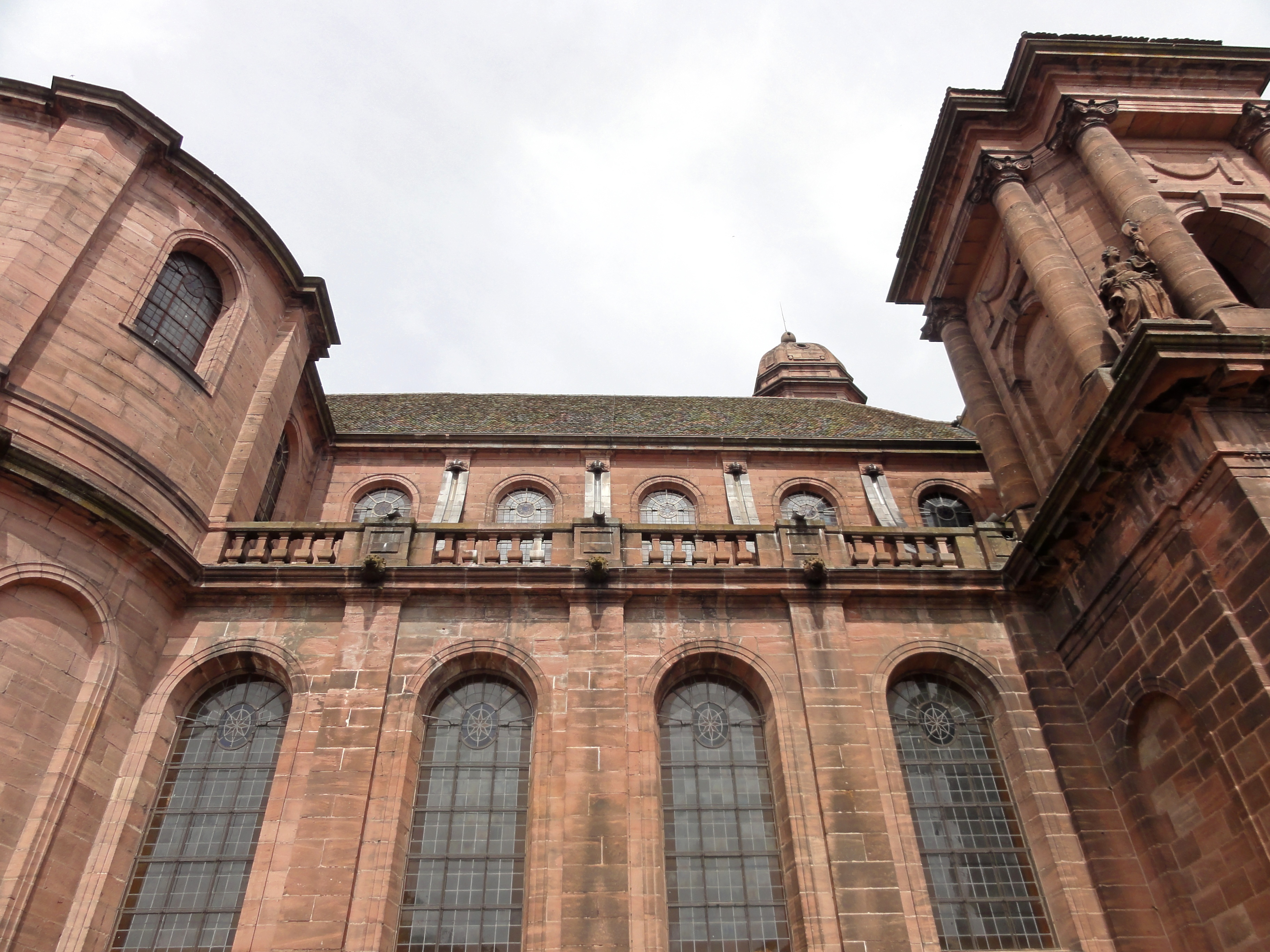 Alsace, Haut-Rhin, Église abbatiale Notre-Dame de Guebwiller (1768-1785), place Jeanne-d'Arc (PA00085438, IA00054832).